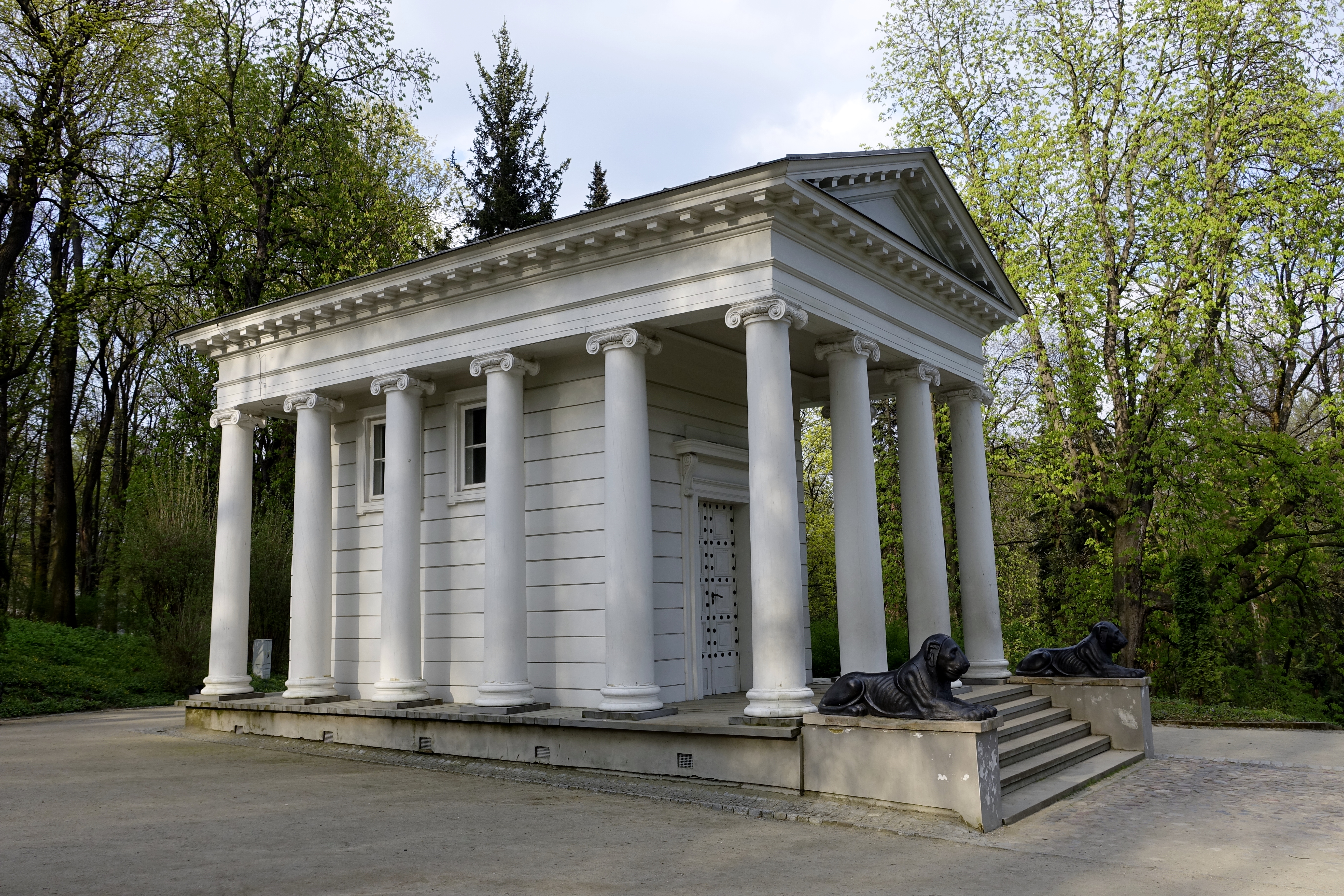 Ujazdów, Warszawa, Poland